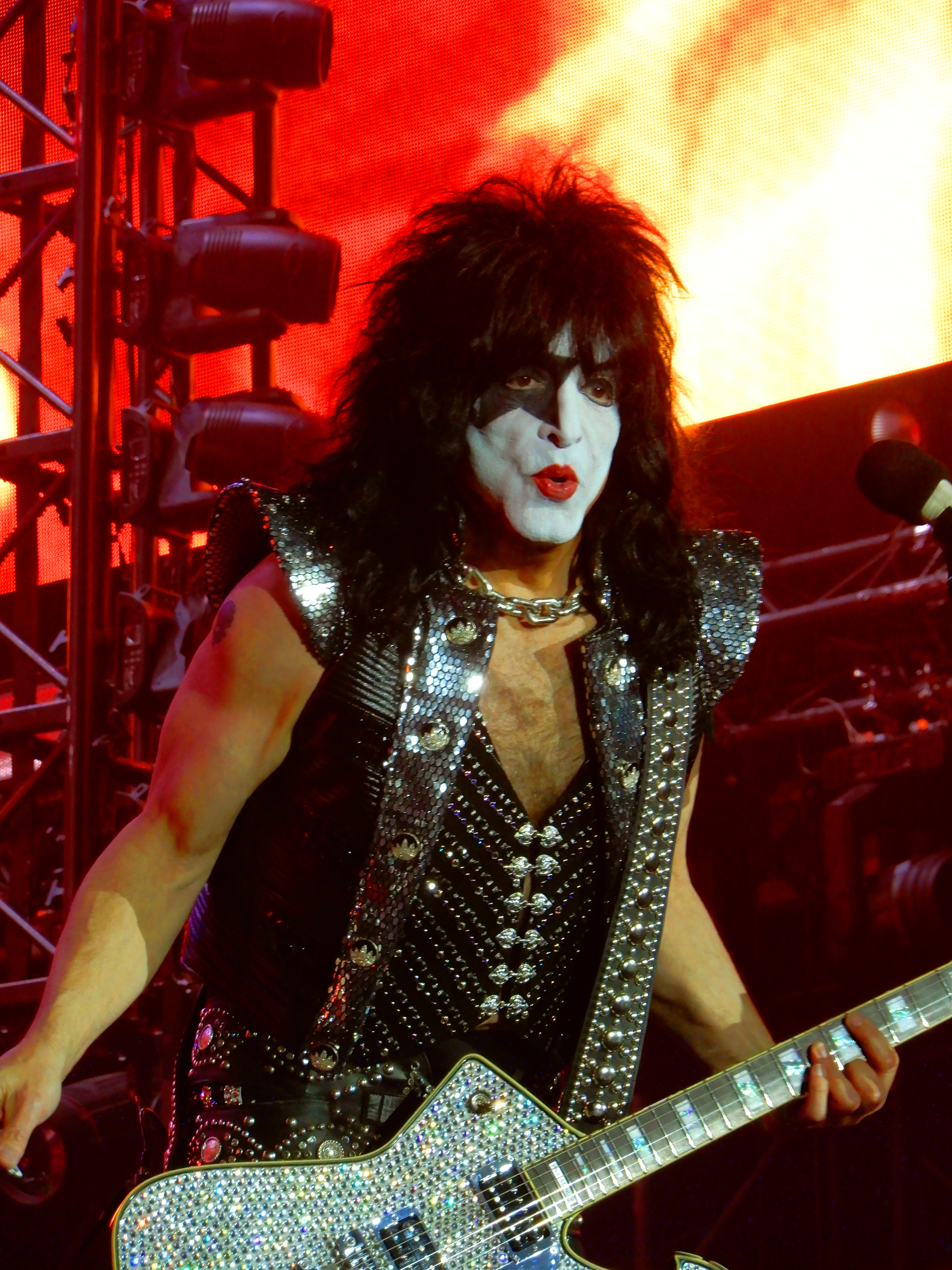 Paul Stanley au Hellfest 2019